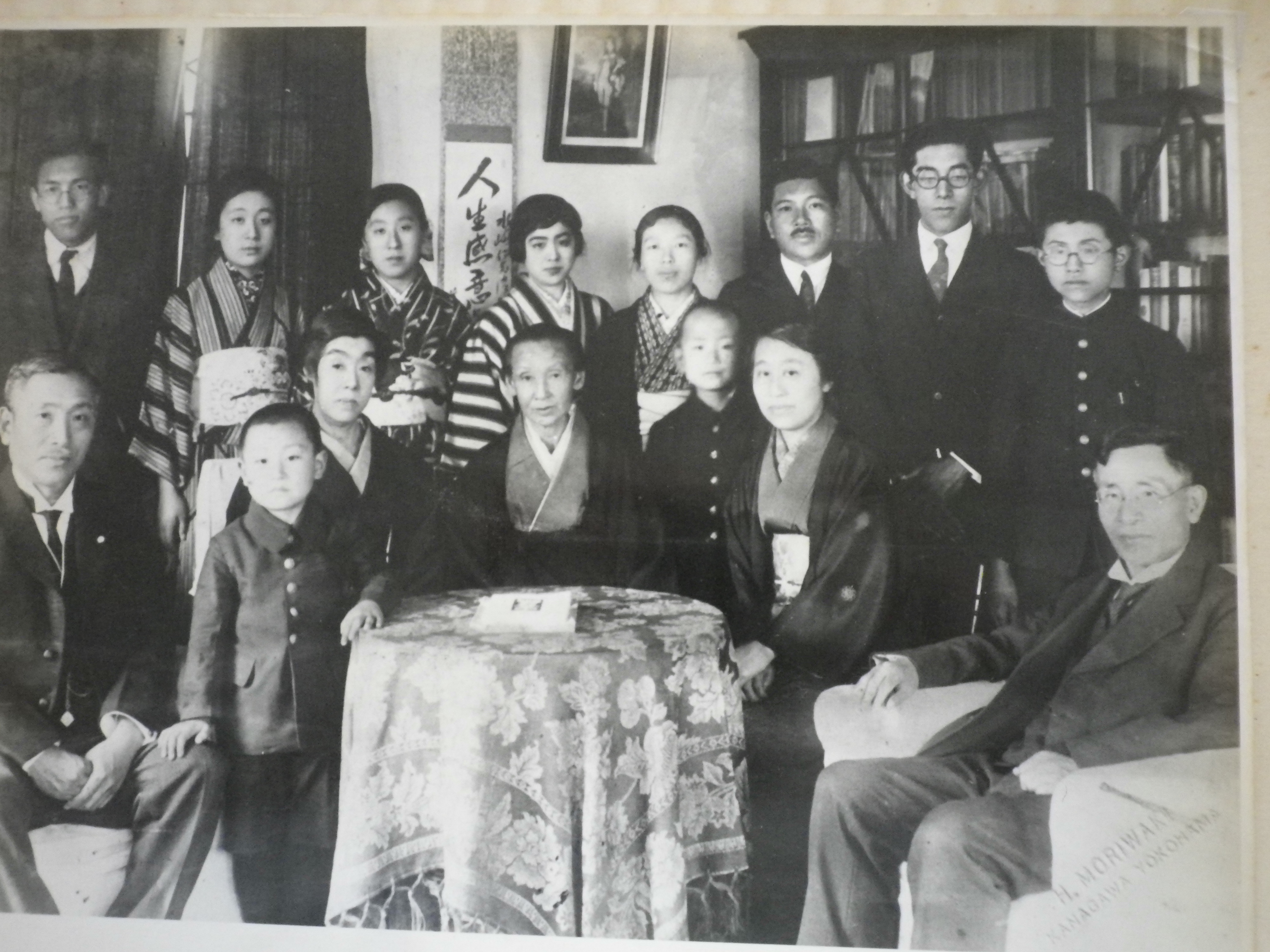 日本、神奈川県横浜市の水崎家の書斎で1928年頃に撮影された写真、 母親の喜寿の祝い、写真に写っている大叔父のアルバム